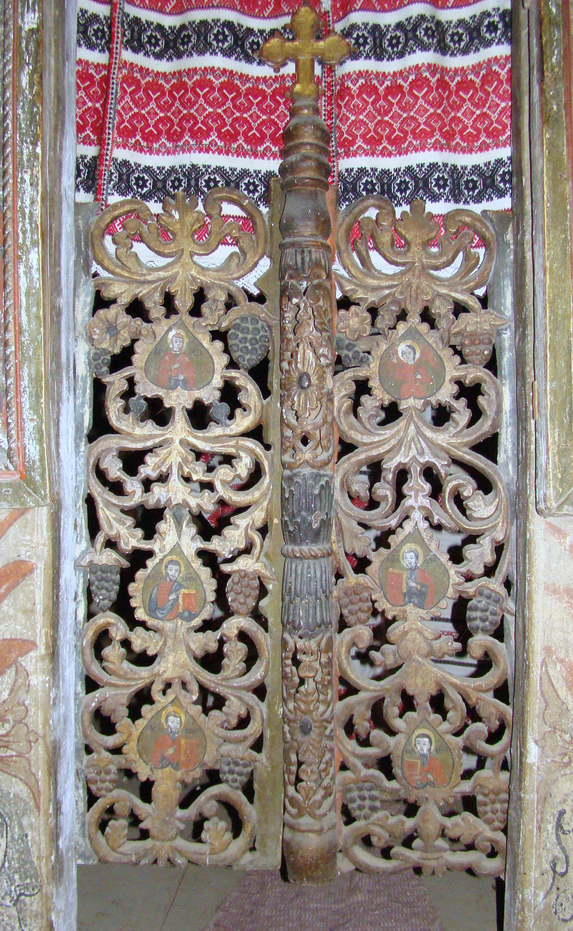 Biserica de lemn „Sfinții Arhangheli Mihail și Gavriil" din Derșida, județul Sălaj